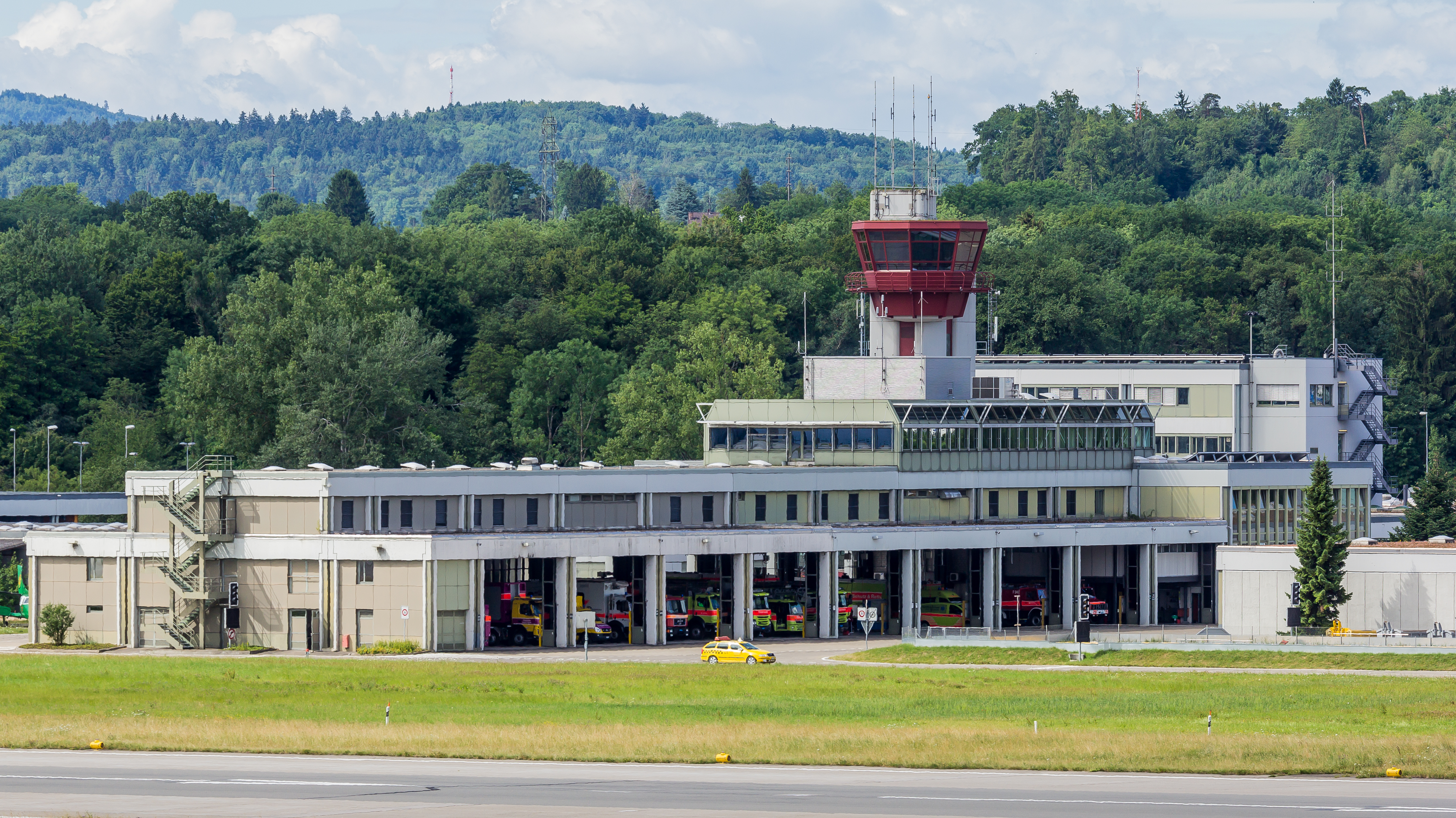 Flughafenfeuerwehr Hauptwache Zurich International Airport